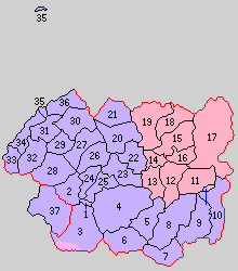 愛媛県喜多郡の町村制時点の町村。